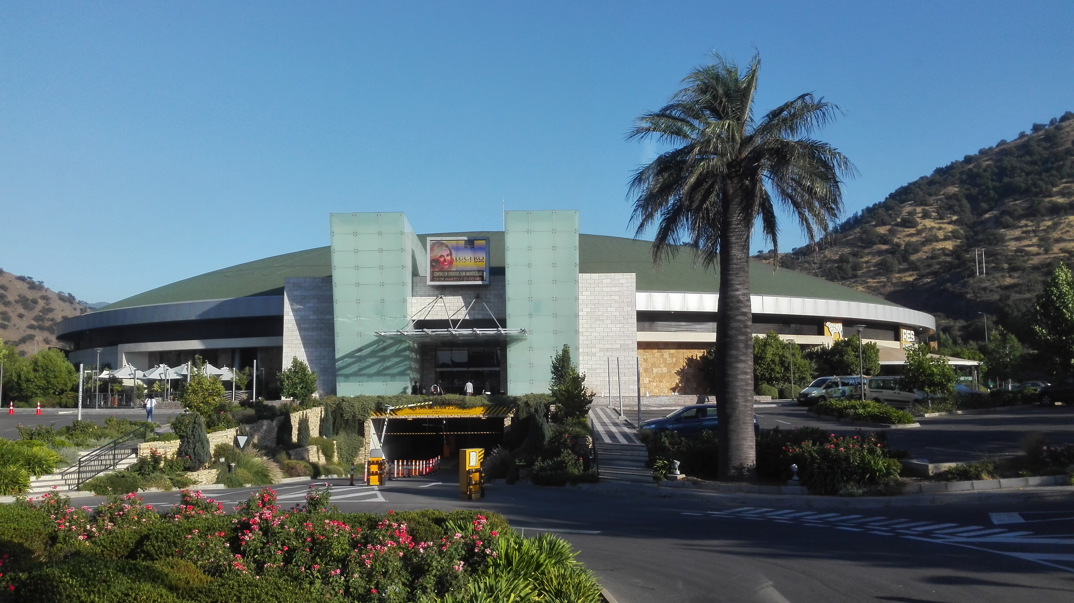 Casino Sun Monticello, Mostazal, Chile.